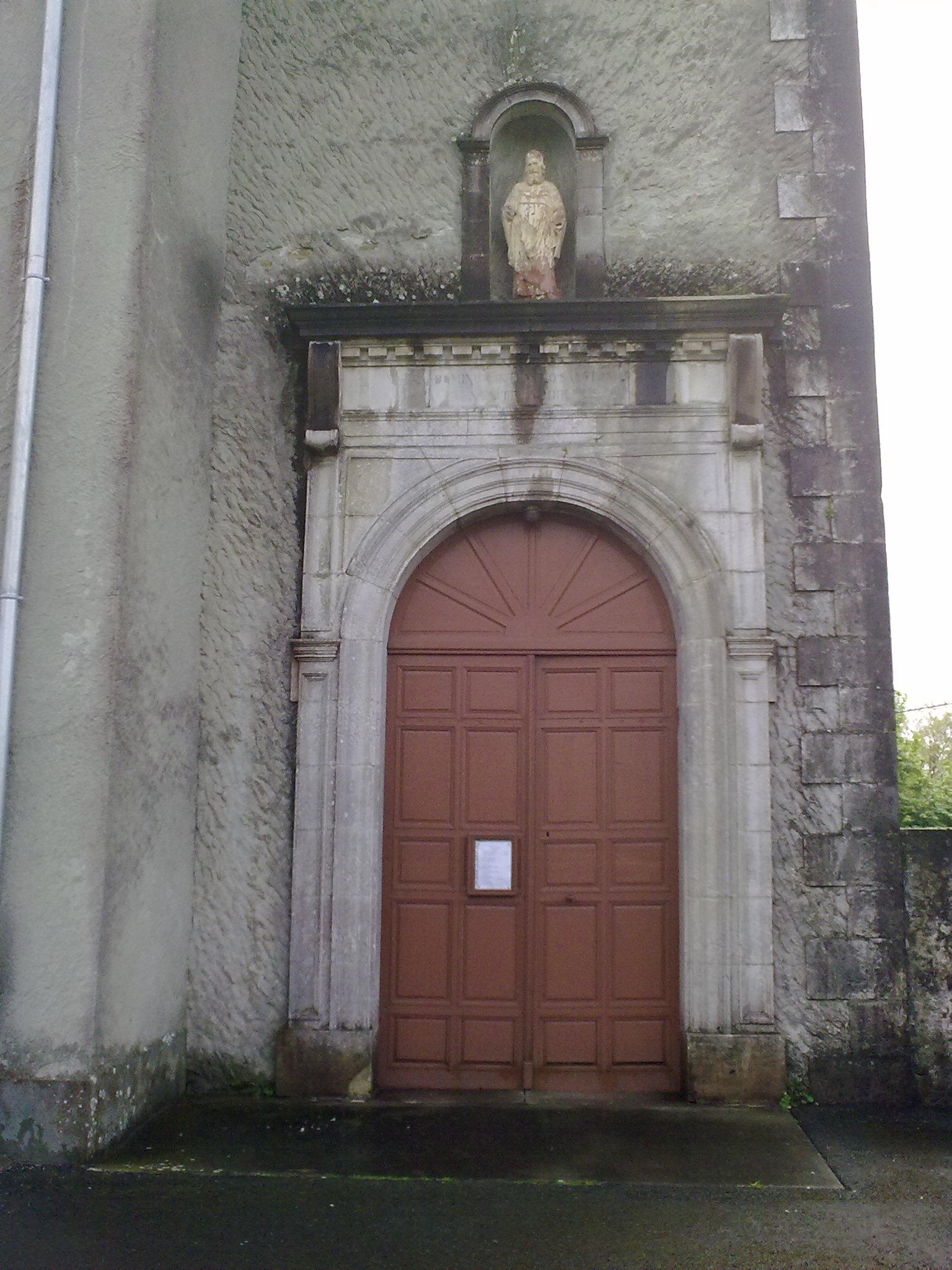 Ramous, France